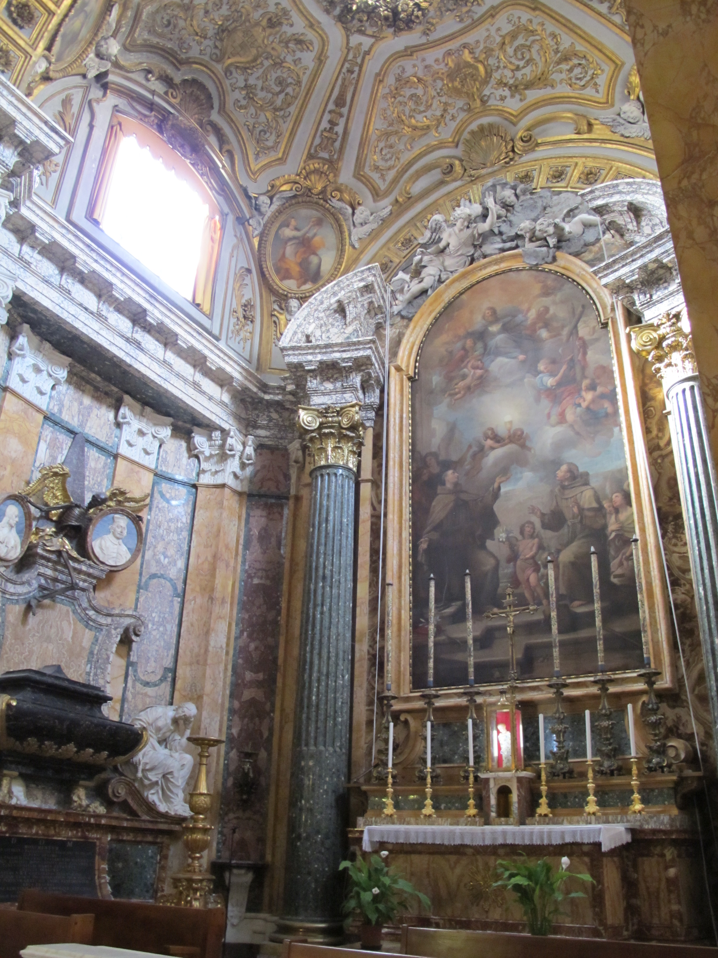 San Francesco a Ripa: Cappella Rospigliosi-Pallavicini